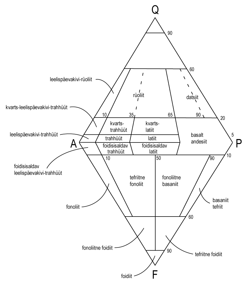 QAPF-diagramm, klassifikatsioon vulkaaniliste kivimite jaoks